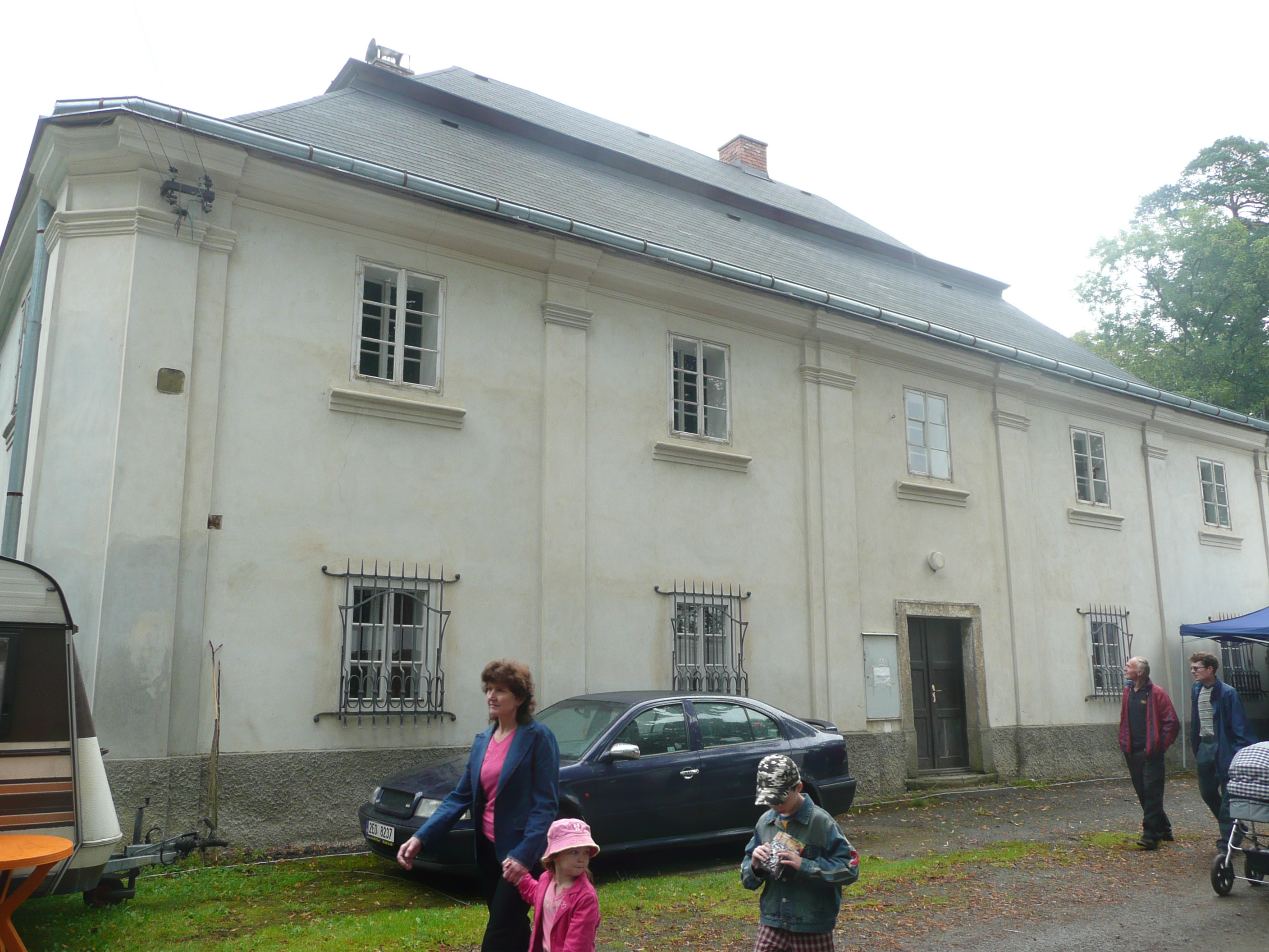 budova bývalých lázní ve Svaté Anně